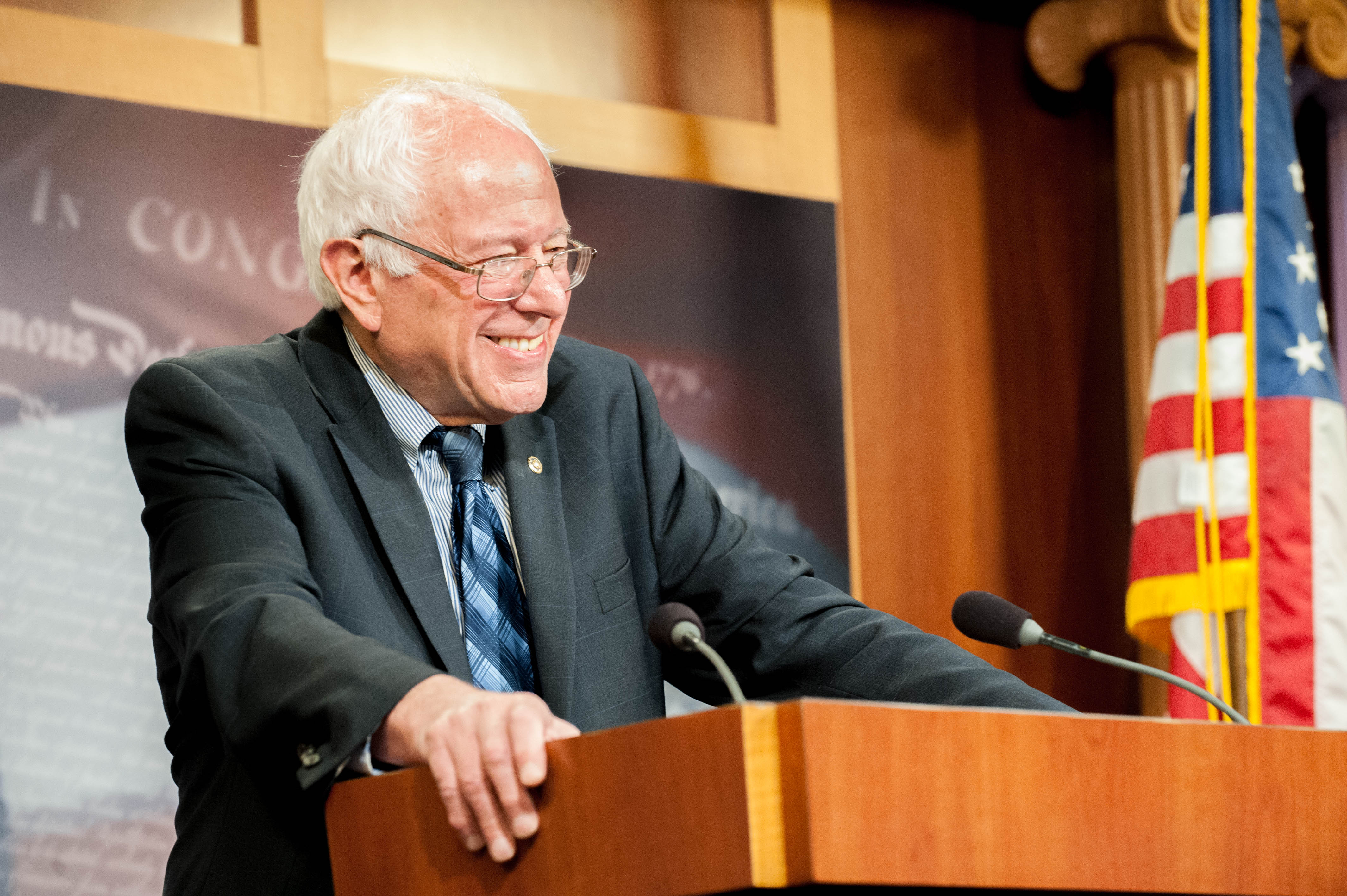 Bernie Sanders Family Leave